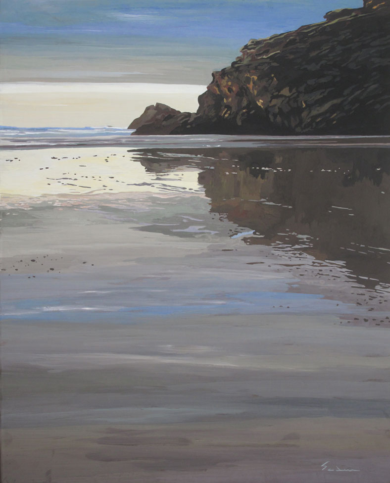 Belle-Ile-en-Mer